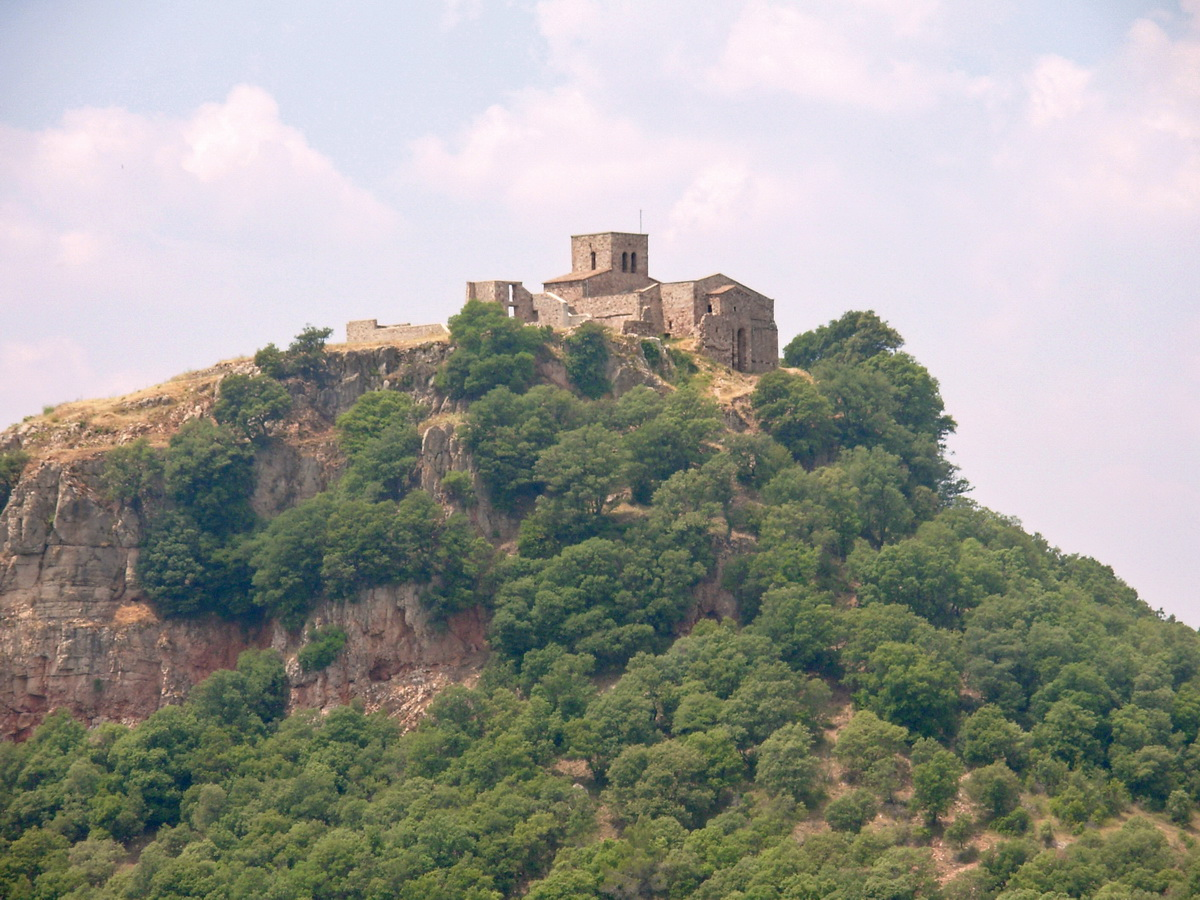 Castell i església de Tagamanent (Vallès Oriental-Catalunya), s. XVII - XIX